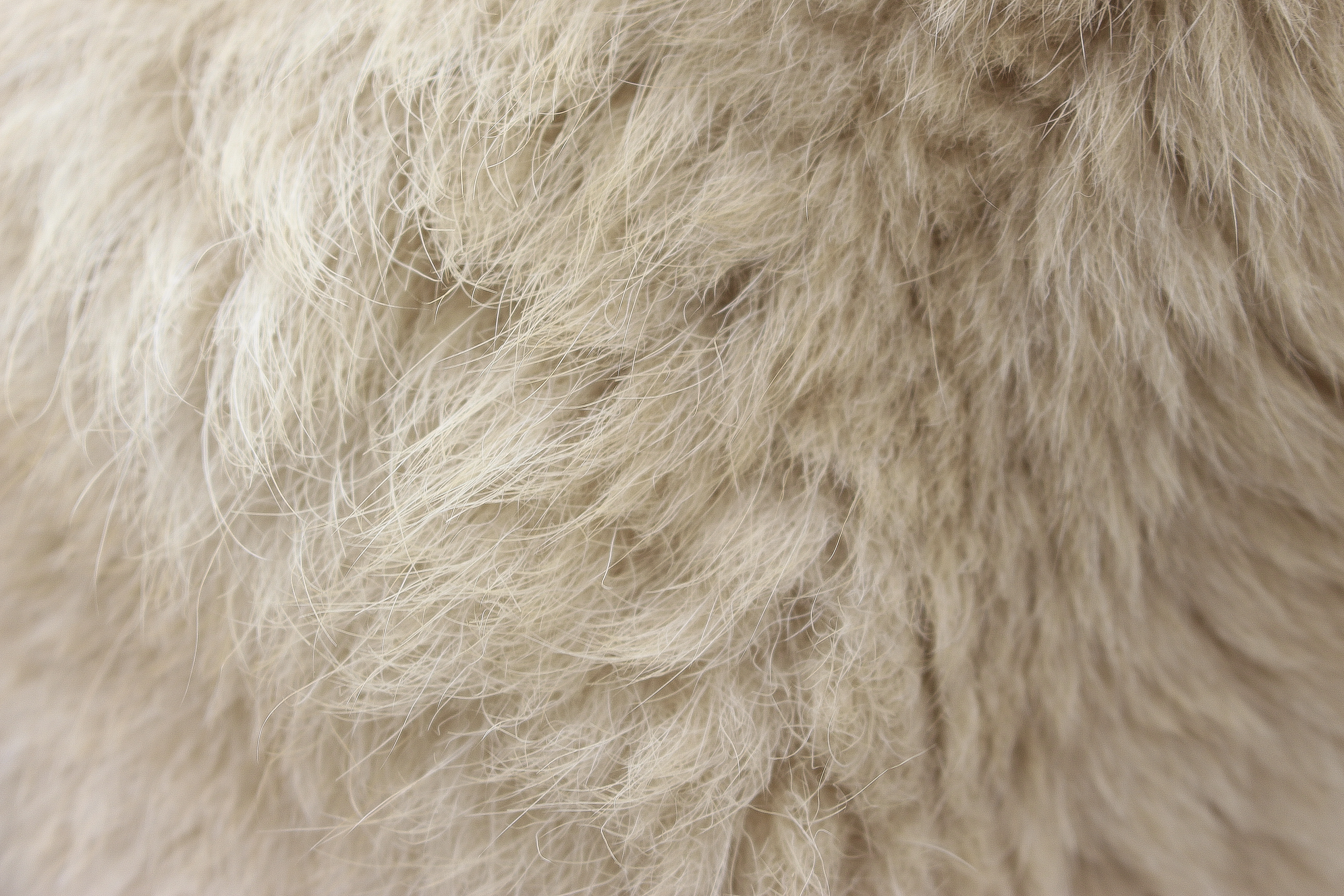 פרווה של כלב